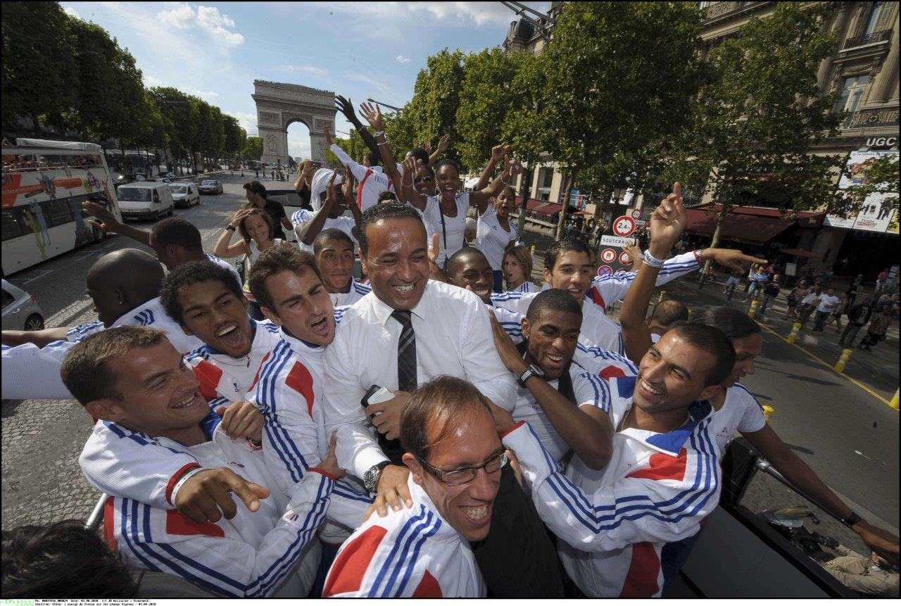 L'équipe de France d'athlétisme et Ghani Yalouz au retour des championnats d'Europe d’athlétisme à Barcelone en 2010.